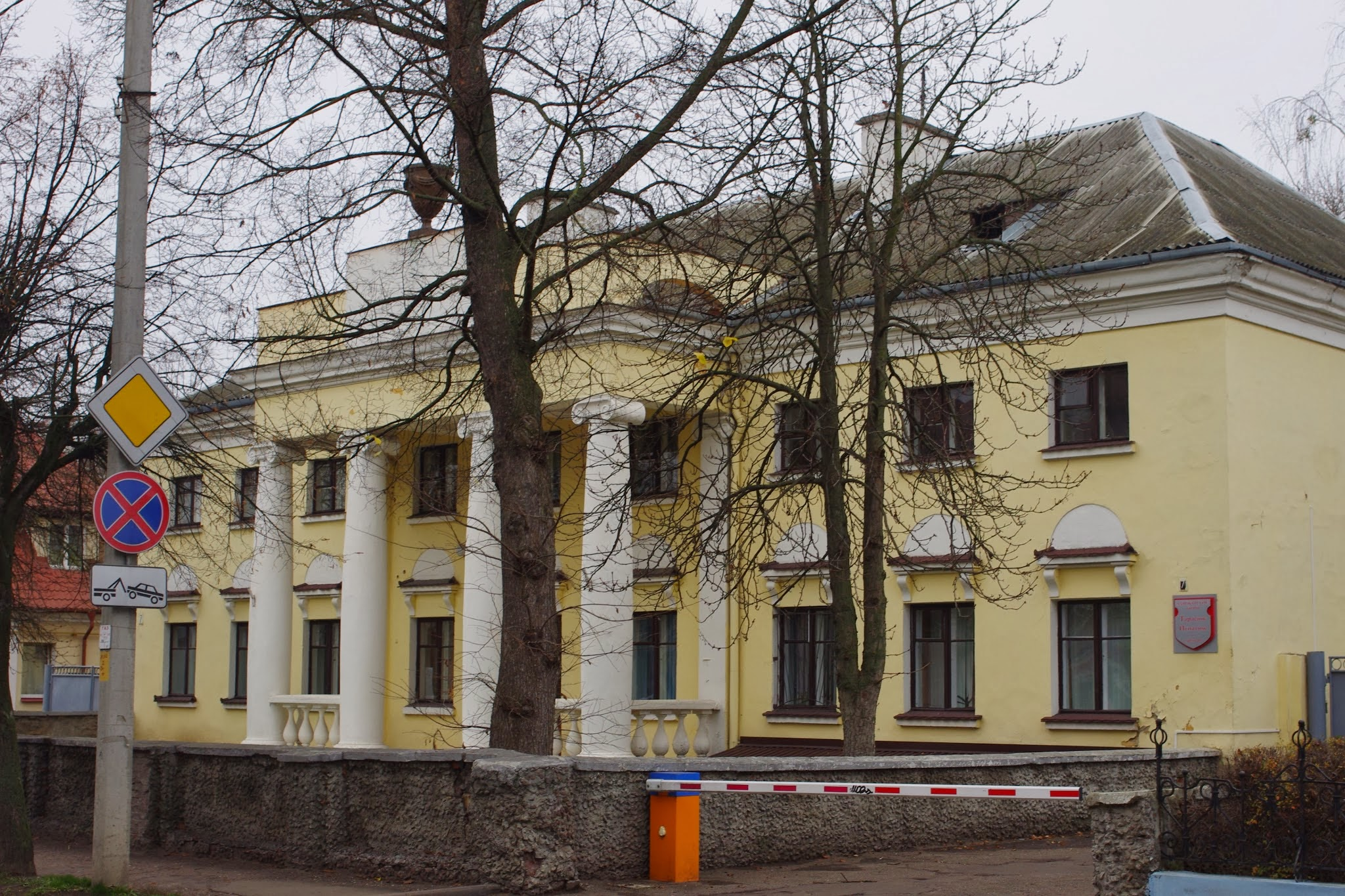 Lieninski rajon, Brest, Belarus